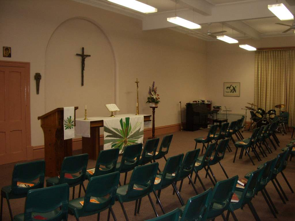 ALC Chapel